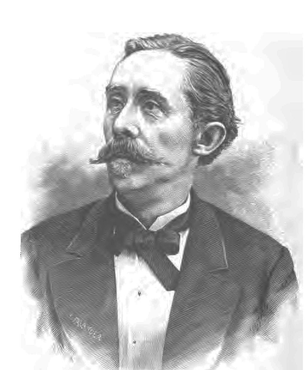 Conrad Nordquist (1840-1920)